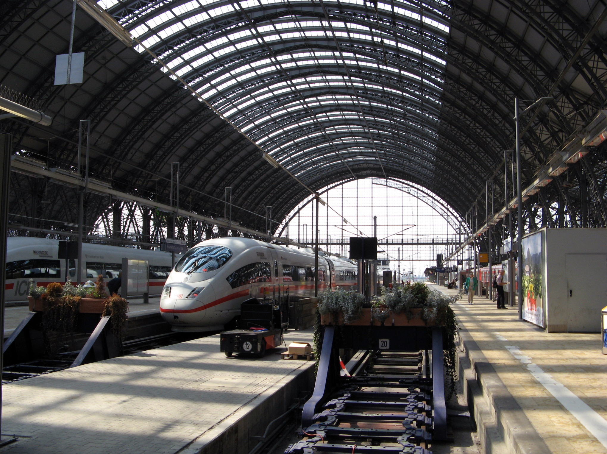 Frankfurt (Main) Hauptbahnhof